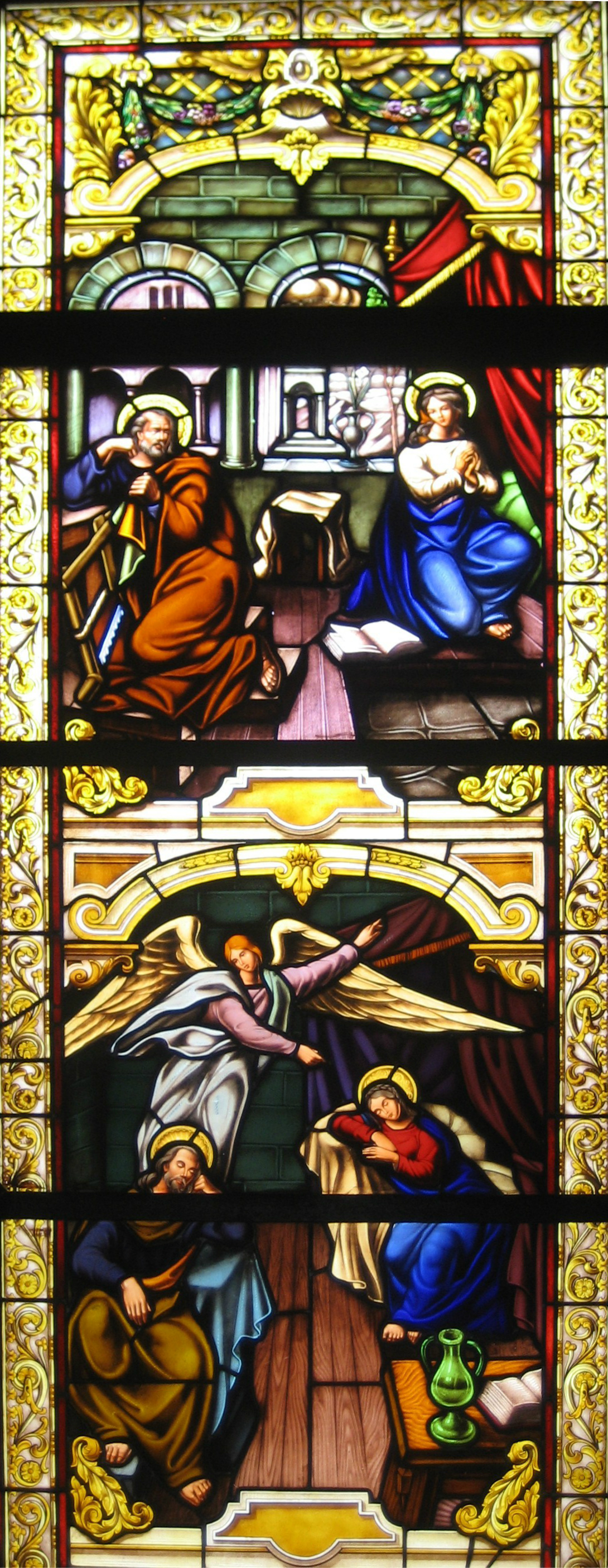 Parroquia de San José de Jatibonico, Cuba: Vitral del Repudio de José a María